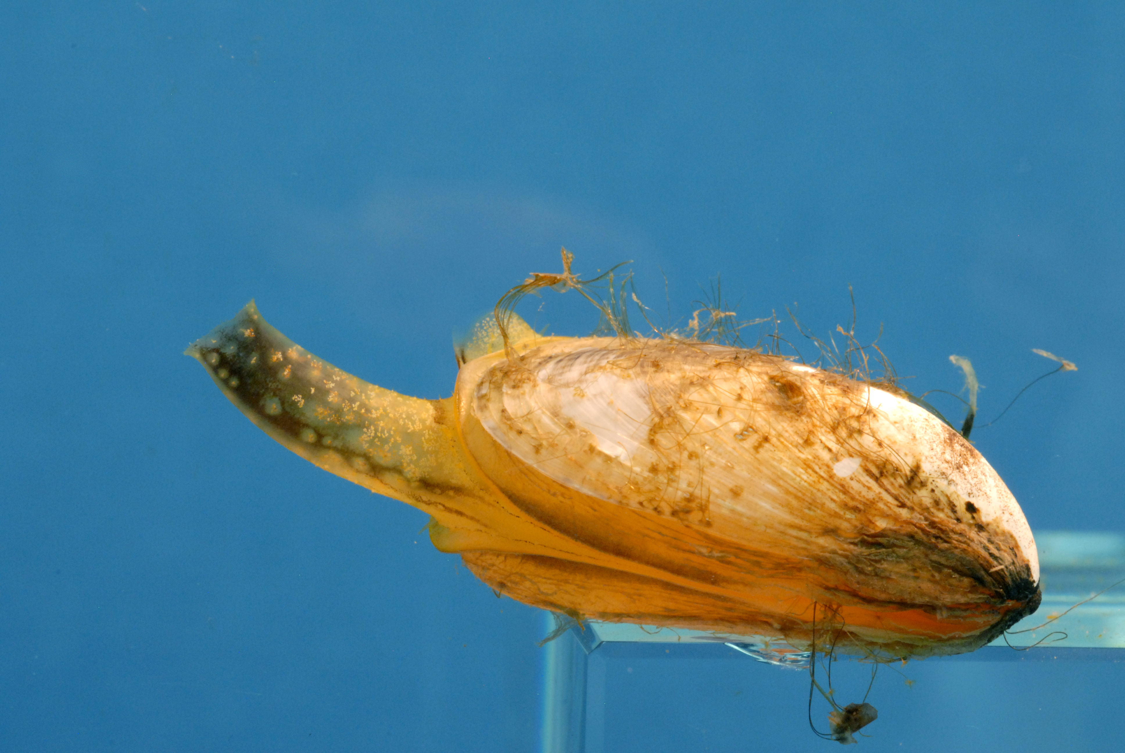 Quagga mussel. GLERL, September 8, 2008.